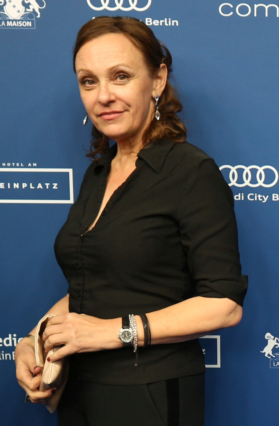 Heike Hanold-Lynch beim Deutschen Schauspielpreis 2017